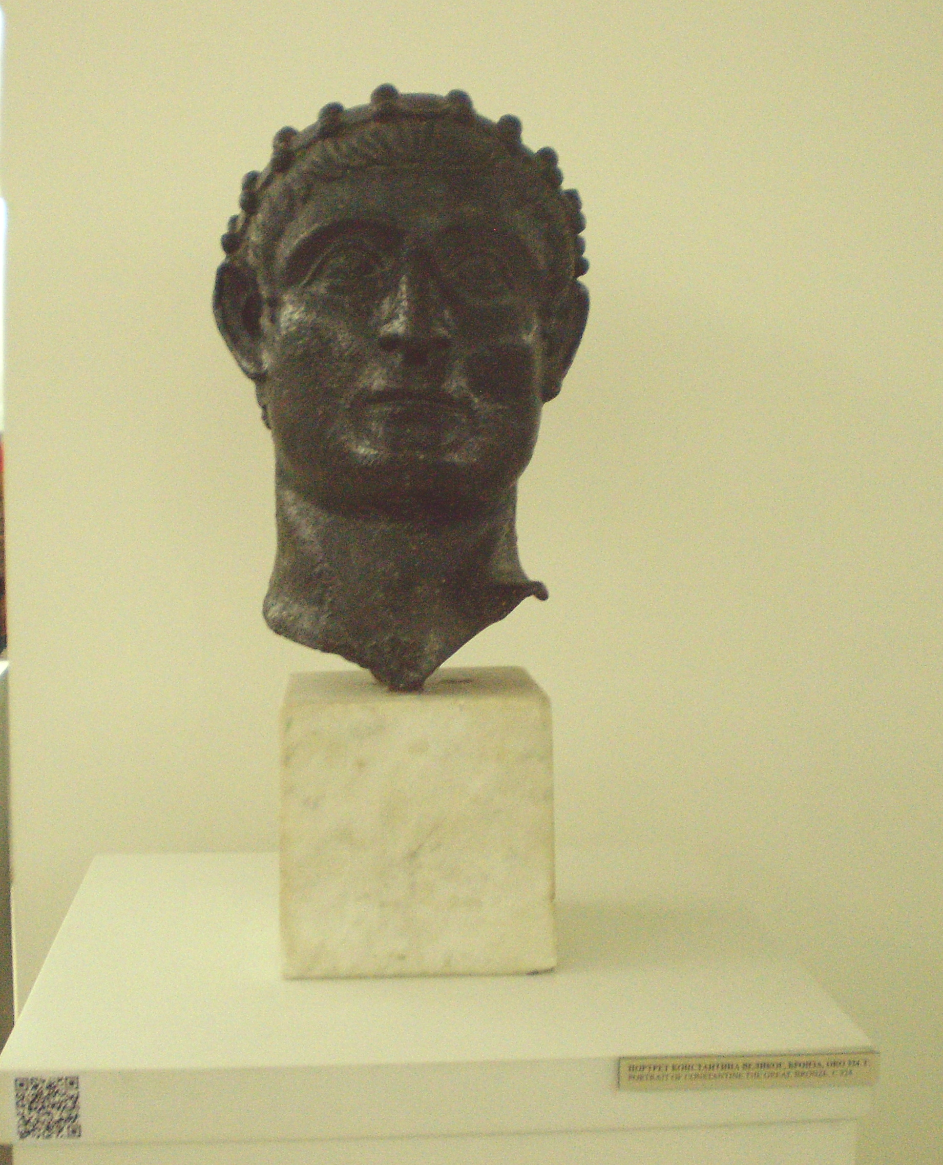 Srpski (latinica): Replika biste Konstantina Velikog, otkrivena u koritu reke Nišave u blizini NIške Tvrđave. Izložena je u stalnoj postavci Narodnog muzeja u Nišu.